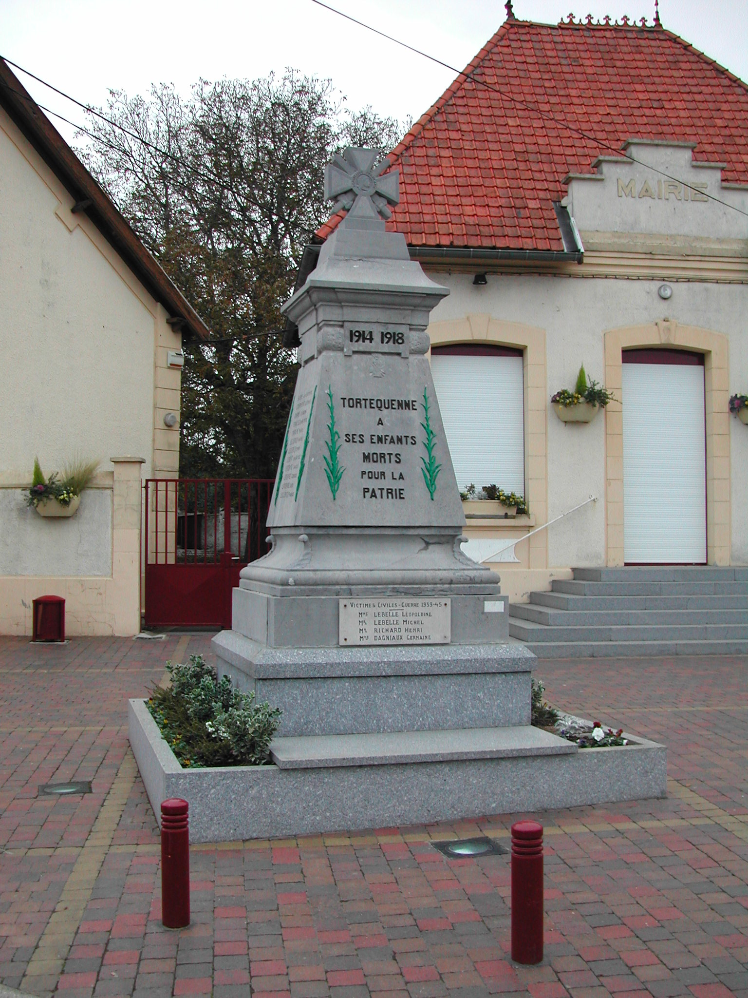 Le monument aux morts de Tortequesne devant la mairie.